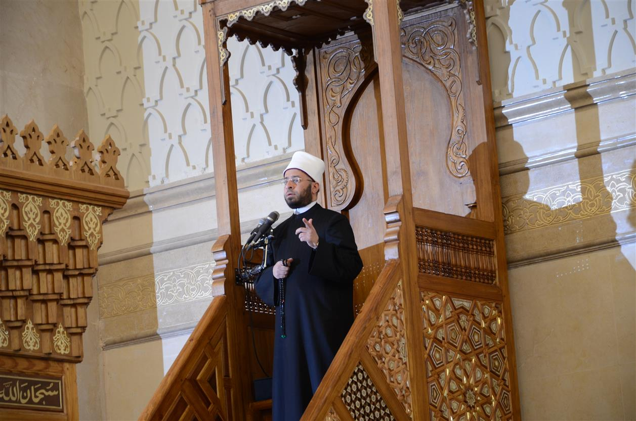 مصرى: الدكتور أسامة الأزهري في مسجد الفتاح العليم